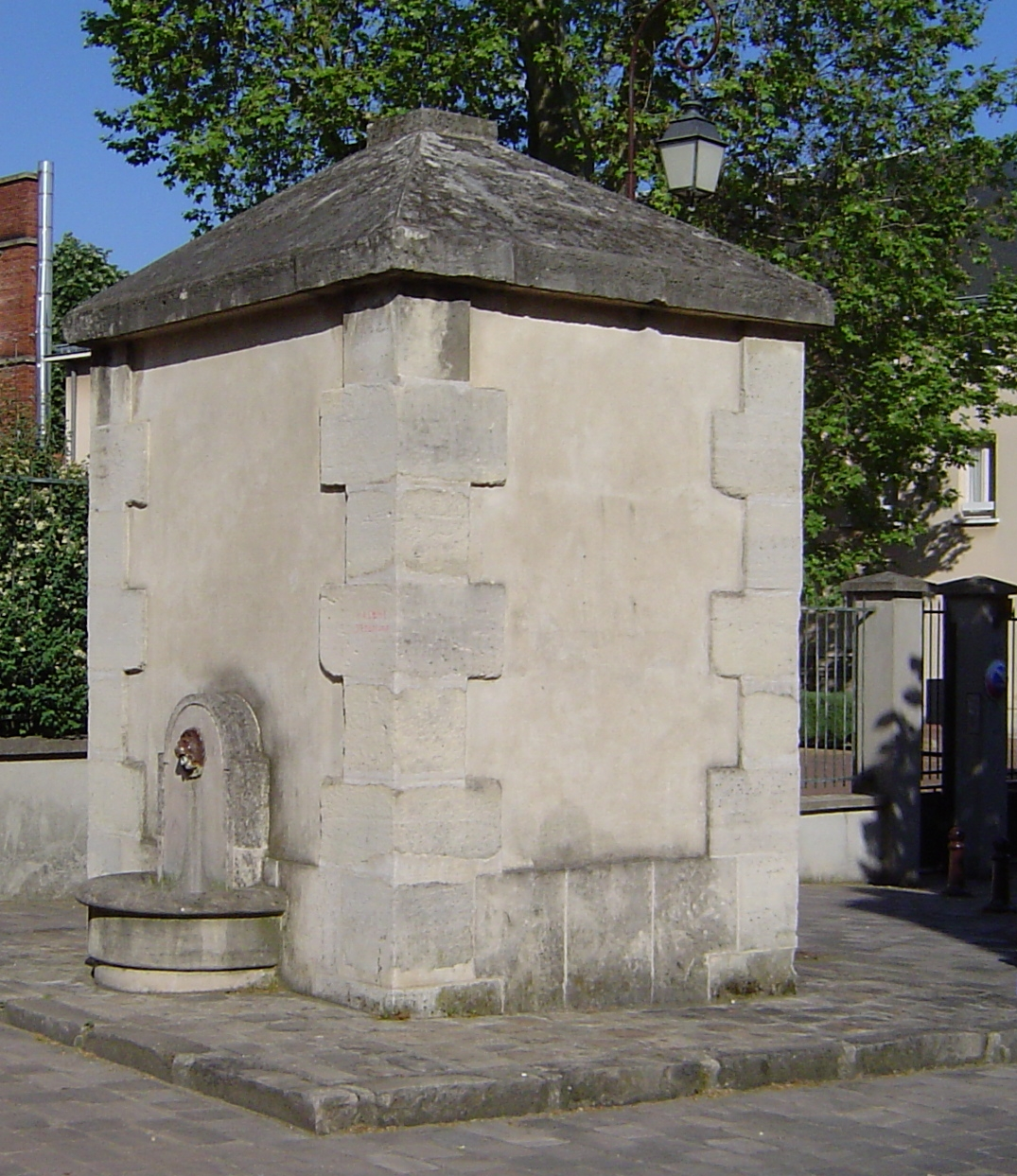 Antony